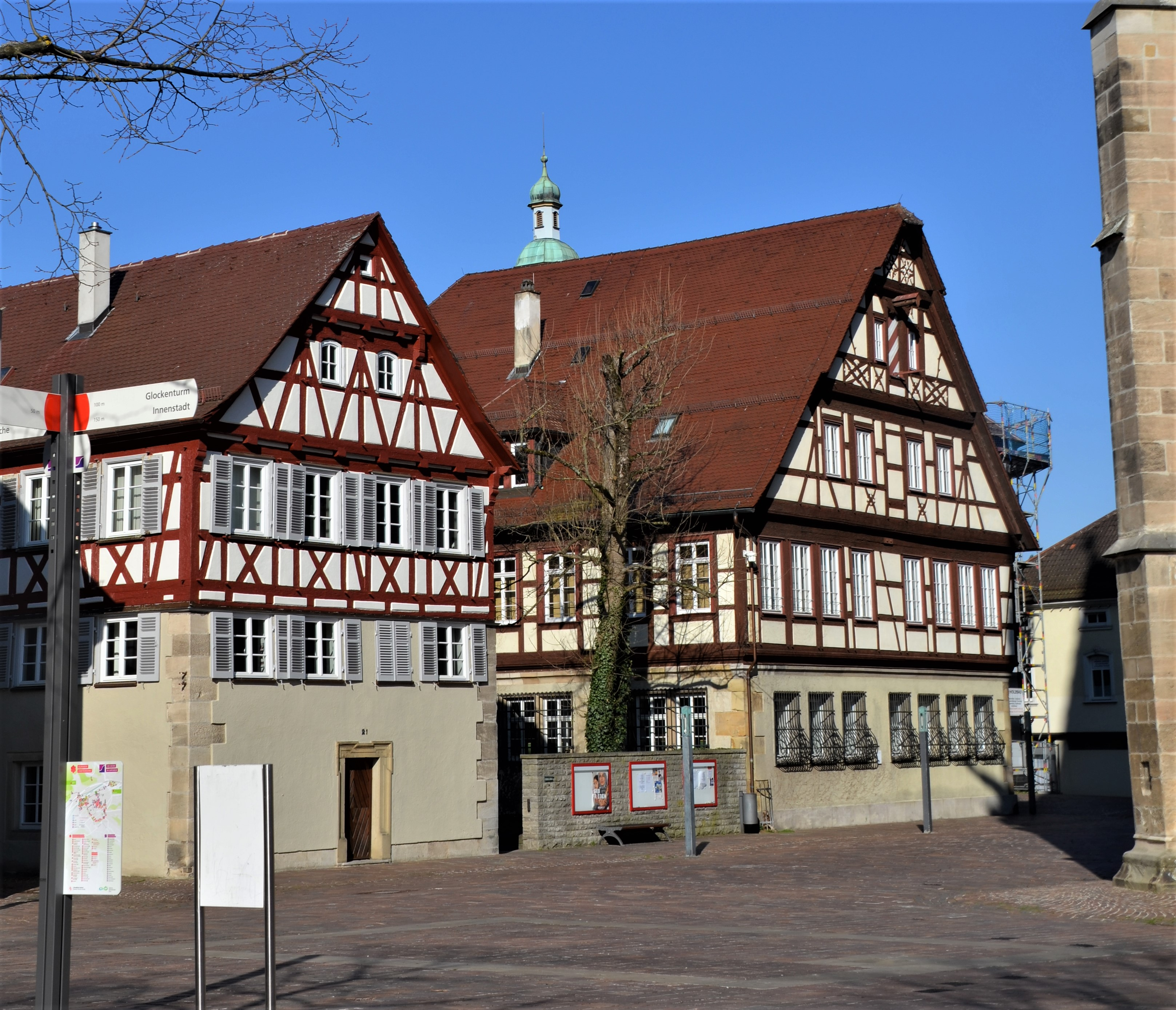 Münsterplatz, links Niklaus-Kaplanei, rechts Stadtarchiv